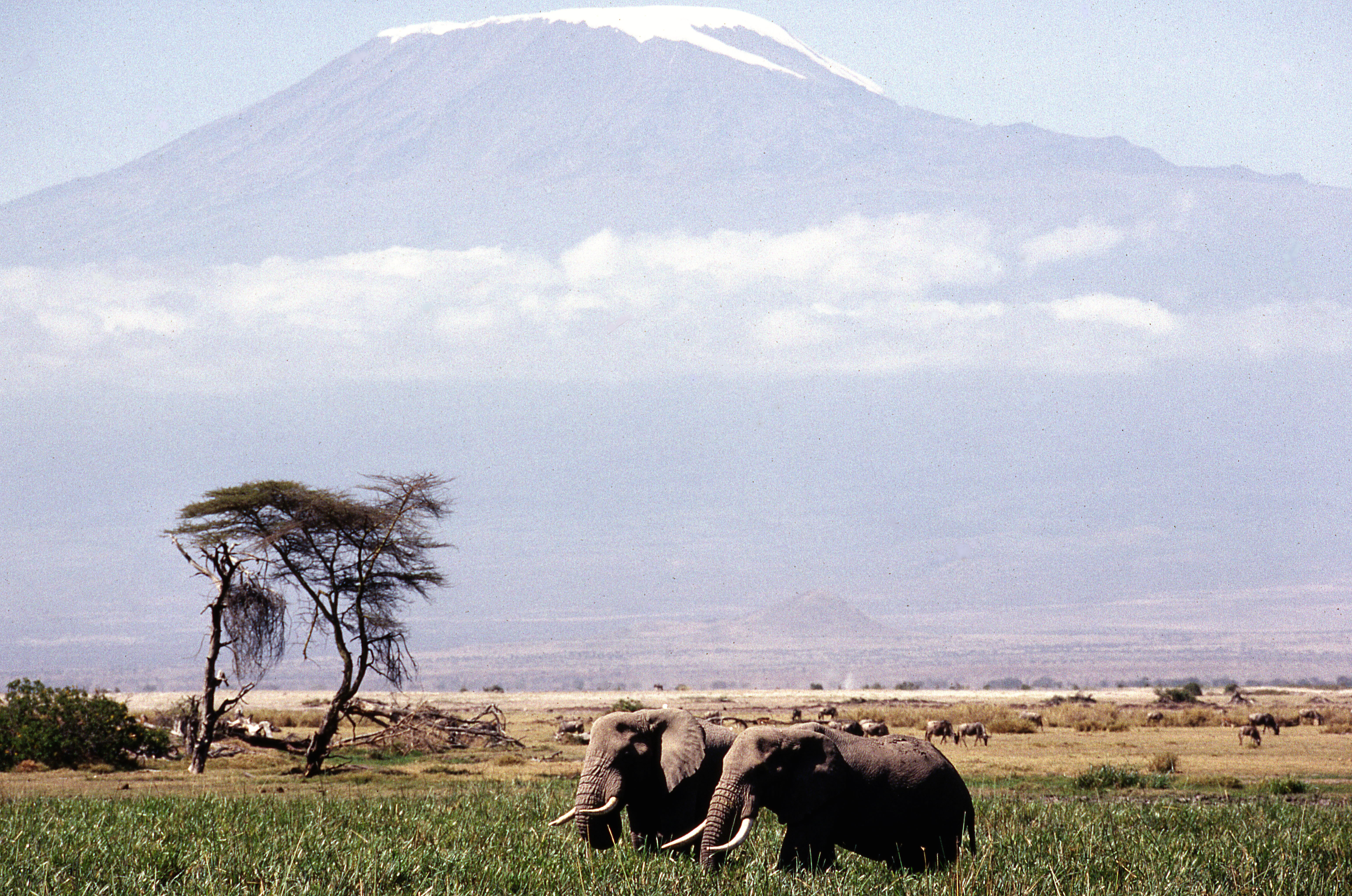 Le_Kilimandjaro__1987.jpg leica r3 apo 180mm